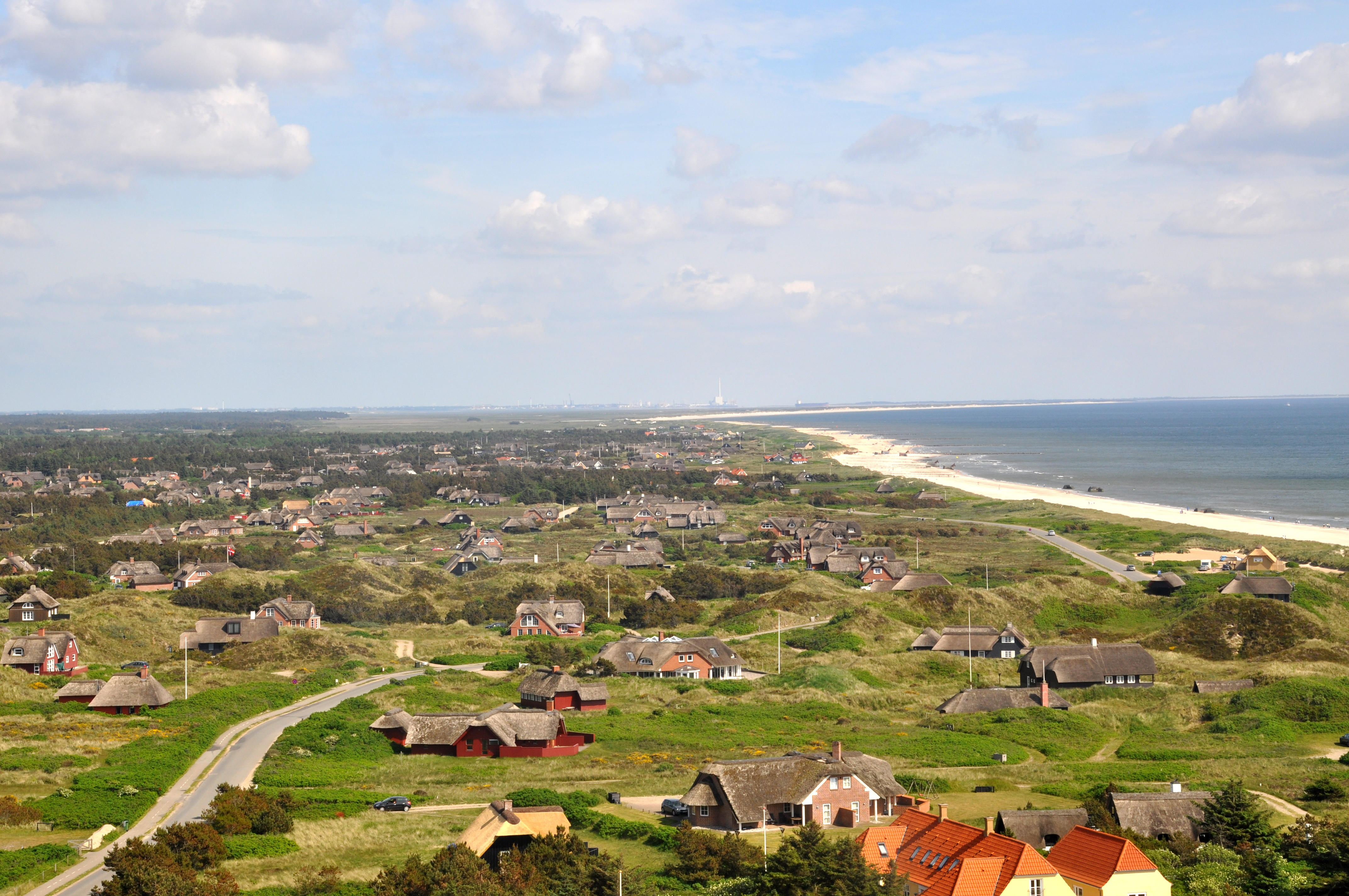 Blick auf Blåvand vom Leuchtturm aus gesehen